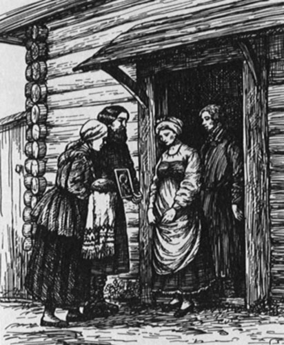 Сговор. Рисунок с гравюры XIX в.